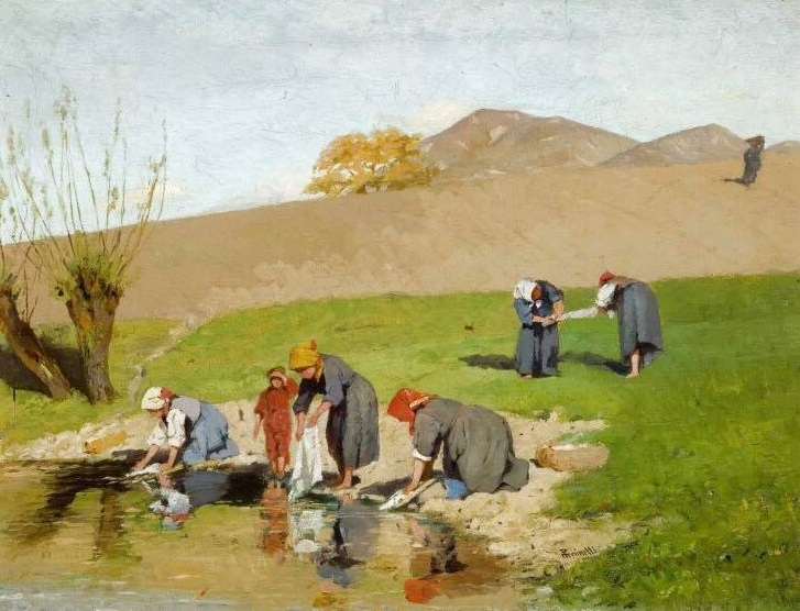 Lavandaie al lavoro, olio su tela, 26.6 x 43.5 cm., Galleria Ricci Oddi, Piacenza